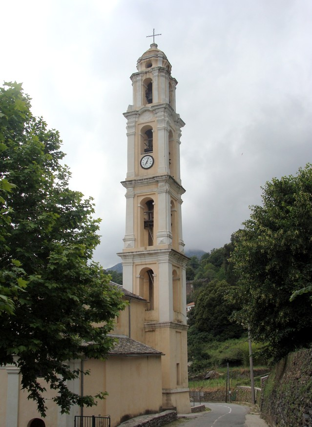 Le clocher de l'église Saint-Elie, à Pietra-di-Verde (Haute-Corse); il mesure 38 mètres de haut.